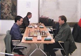 John Emms - Nick de Firmian, Deutsche Schachbundesliga 2000/2001, Runde 9 am 18. Februar 2001 in Solingen.